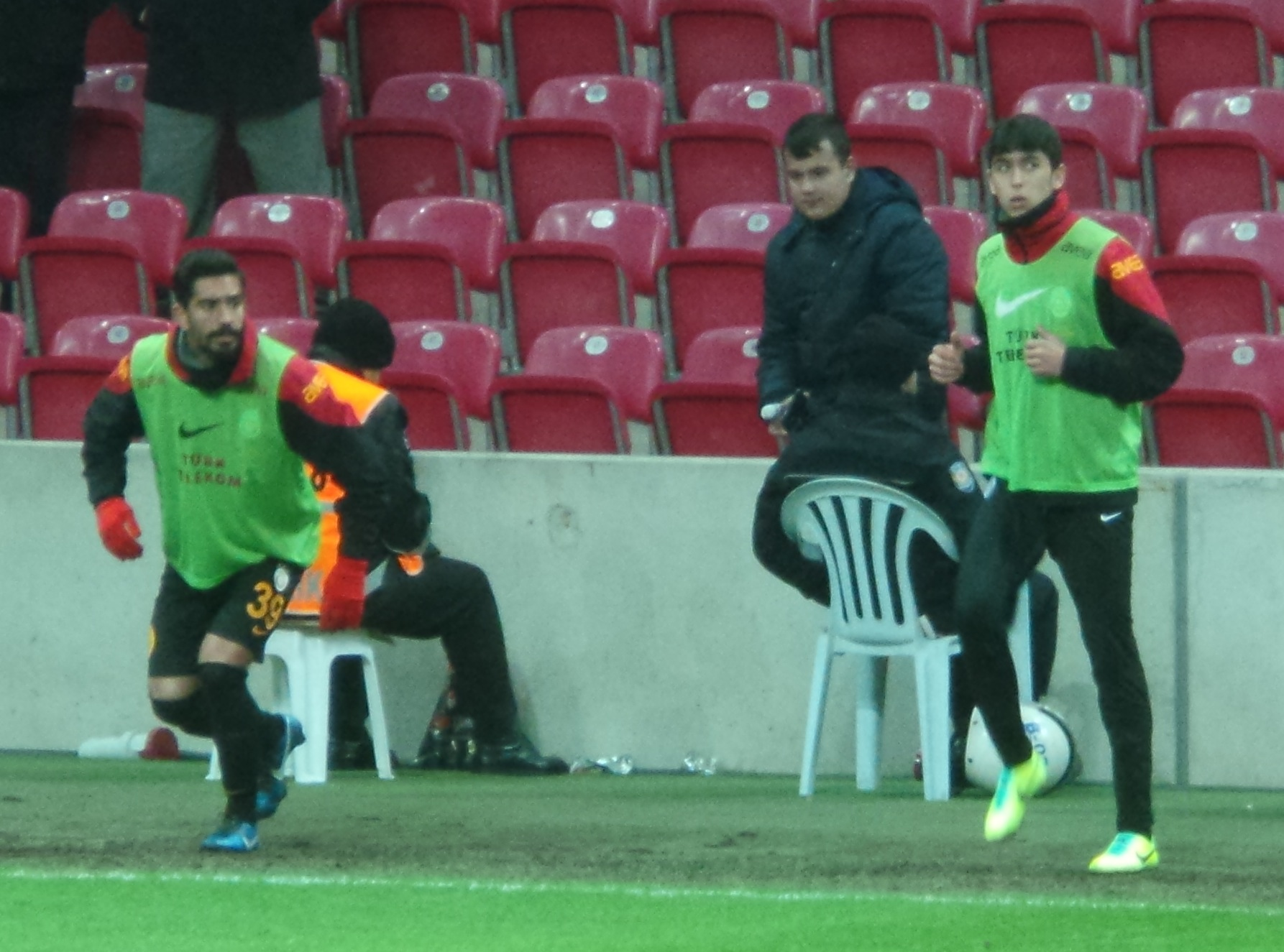 Emre Can Coşkun ve Yiğit Gökoğlan Antep BŞB maçında ısınırken